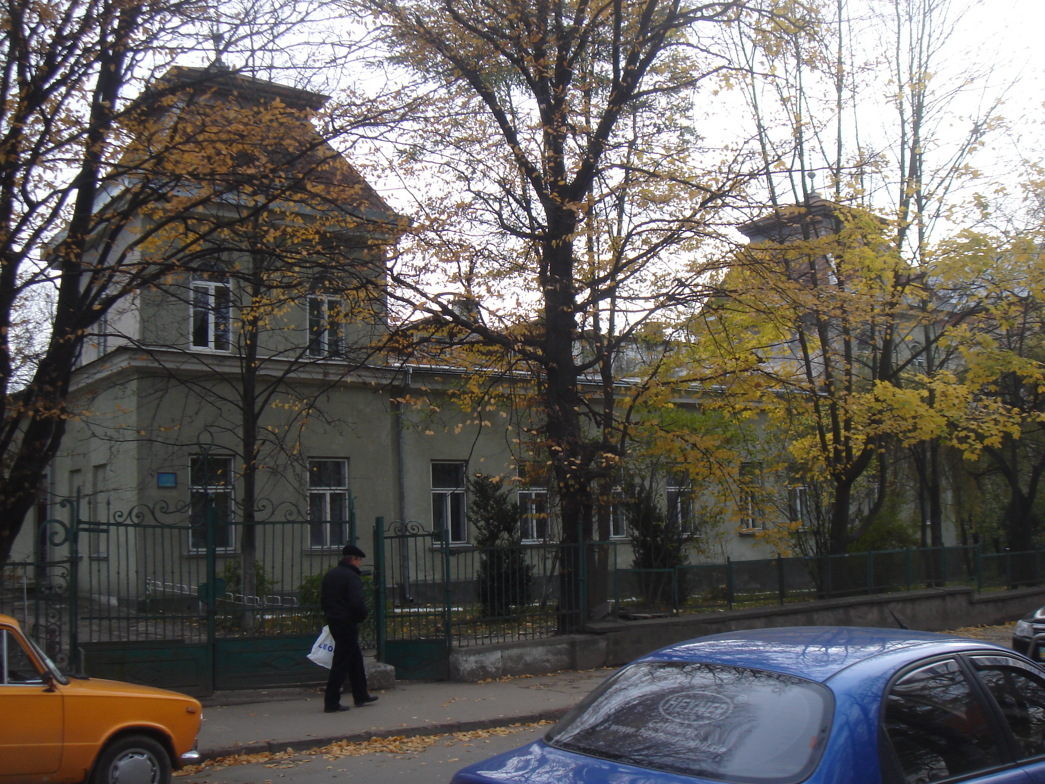 Гімназія, вул. П. Орлика, 8